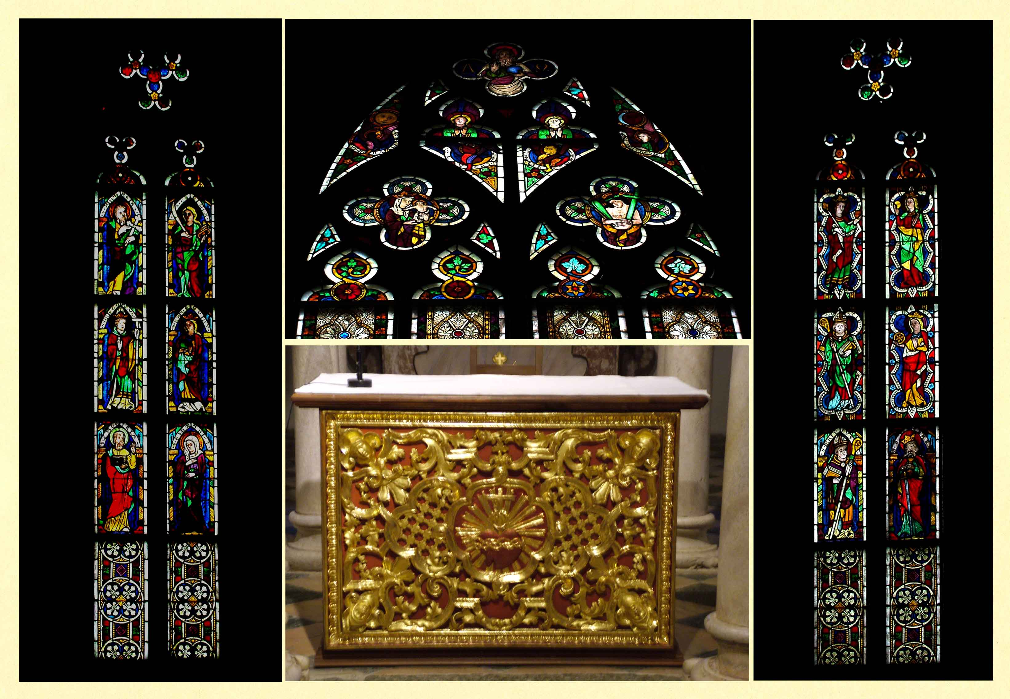 Gurki székesegyház (Ausztria): a főbejárat körüli színes üvegmozaikok, valamint az altemplom aranyozott oltára